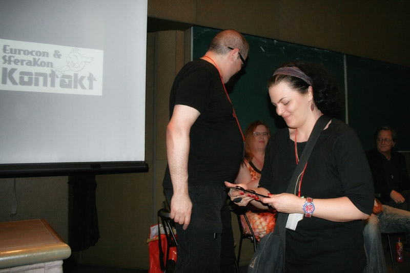 Konvencija Kontakt, koja je spojila 34. SFeraKon i 34. Eurocon u Zagrebu